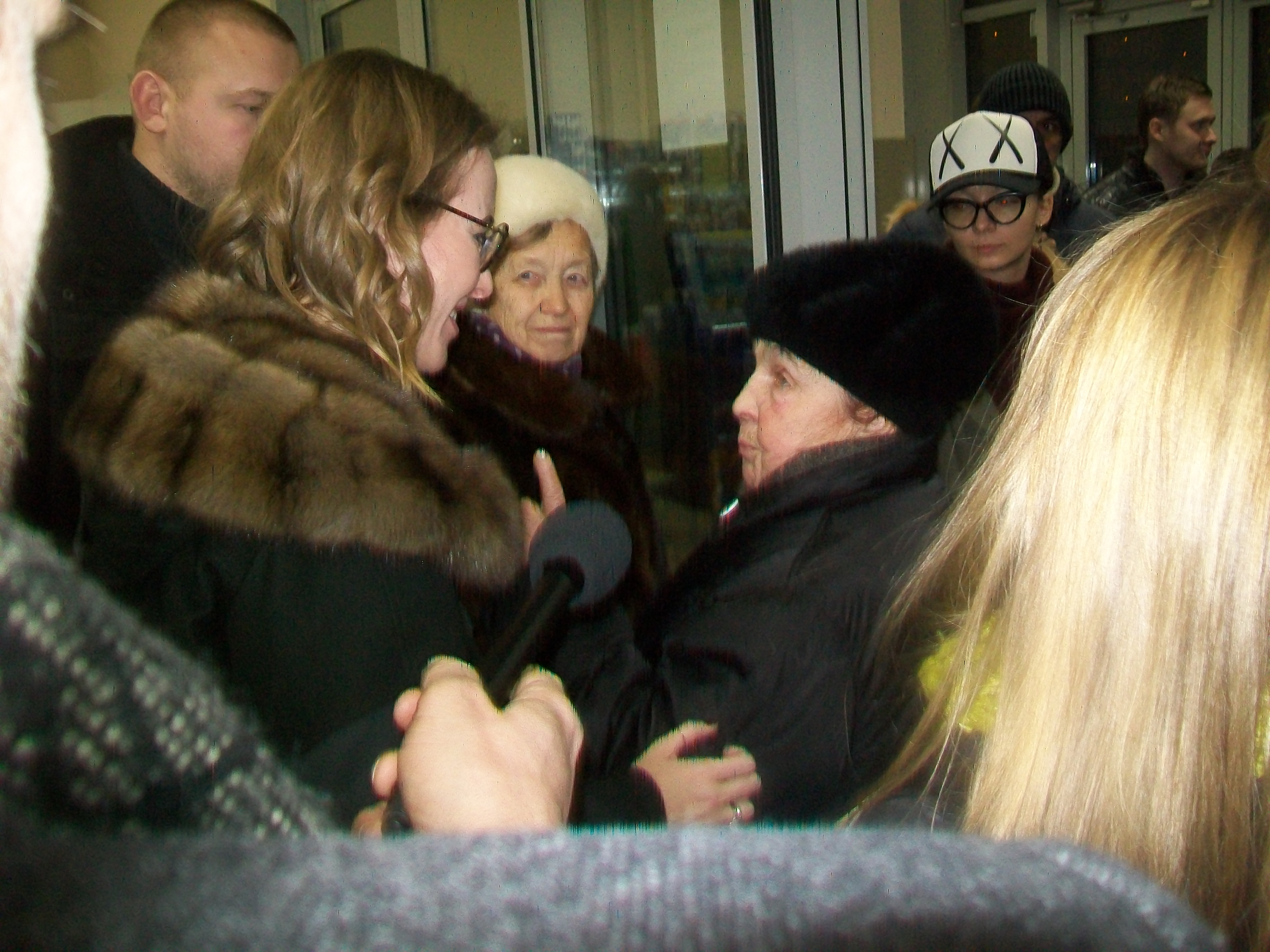 Ксения Собчак с екатеринбургской пенсионеркой